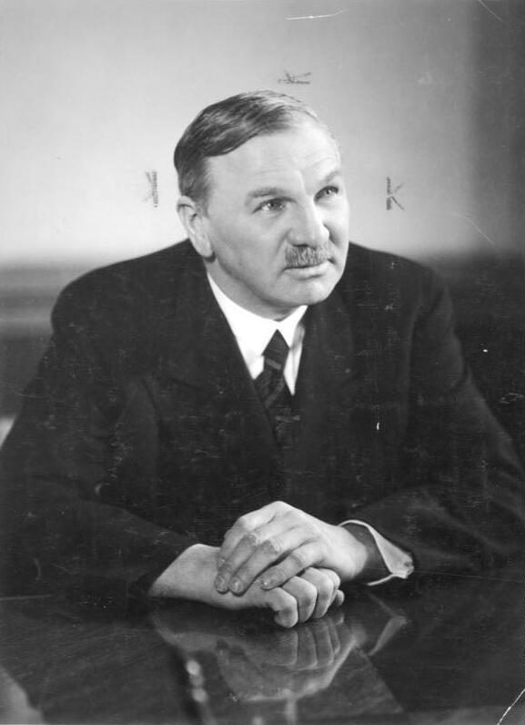 Dr. h. c. Heinrich Koppenberg 60 Jahre Am 15. März d. J. begeht eine der markantesten Persönlichkeiten der deutschen Wirtschaft, Dr. h. c. Heinrich Koppenberg, Wehrwirtschaftsführer und Generaldirektor der Junkers Flugzeug- und Motorenwerke AG. seinen 60. Geburtstag.